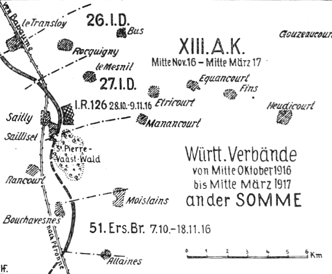 Karte Seite 59: Württ. Verbände von Mitte Oktober 1916 bis Mitte März 1917 an der Somme